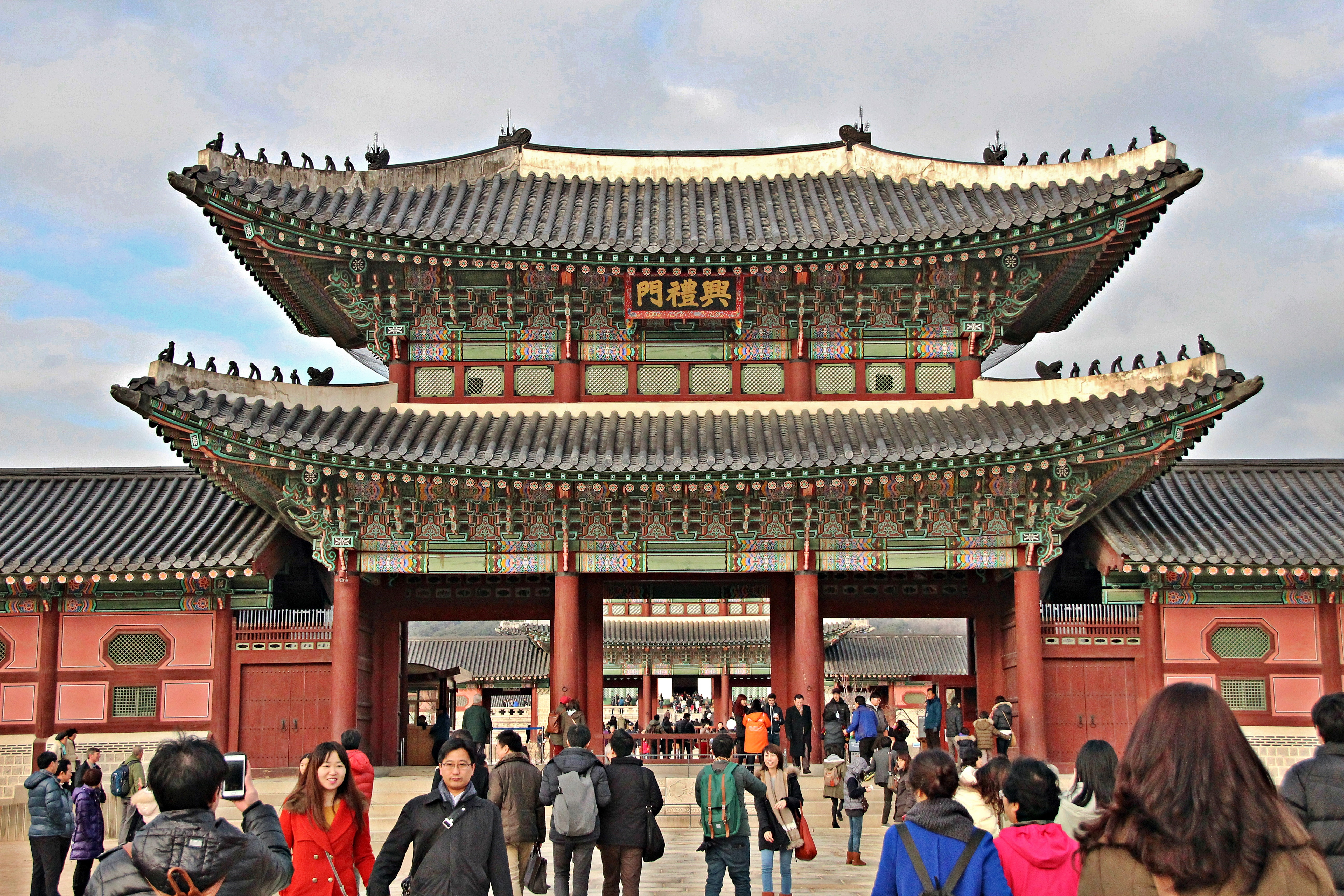 Heungnyemun Gate(흥례문) is middle Gate among triple gates to enter the Gyeongbokgung Palace.